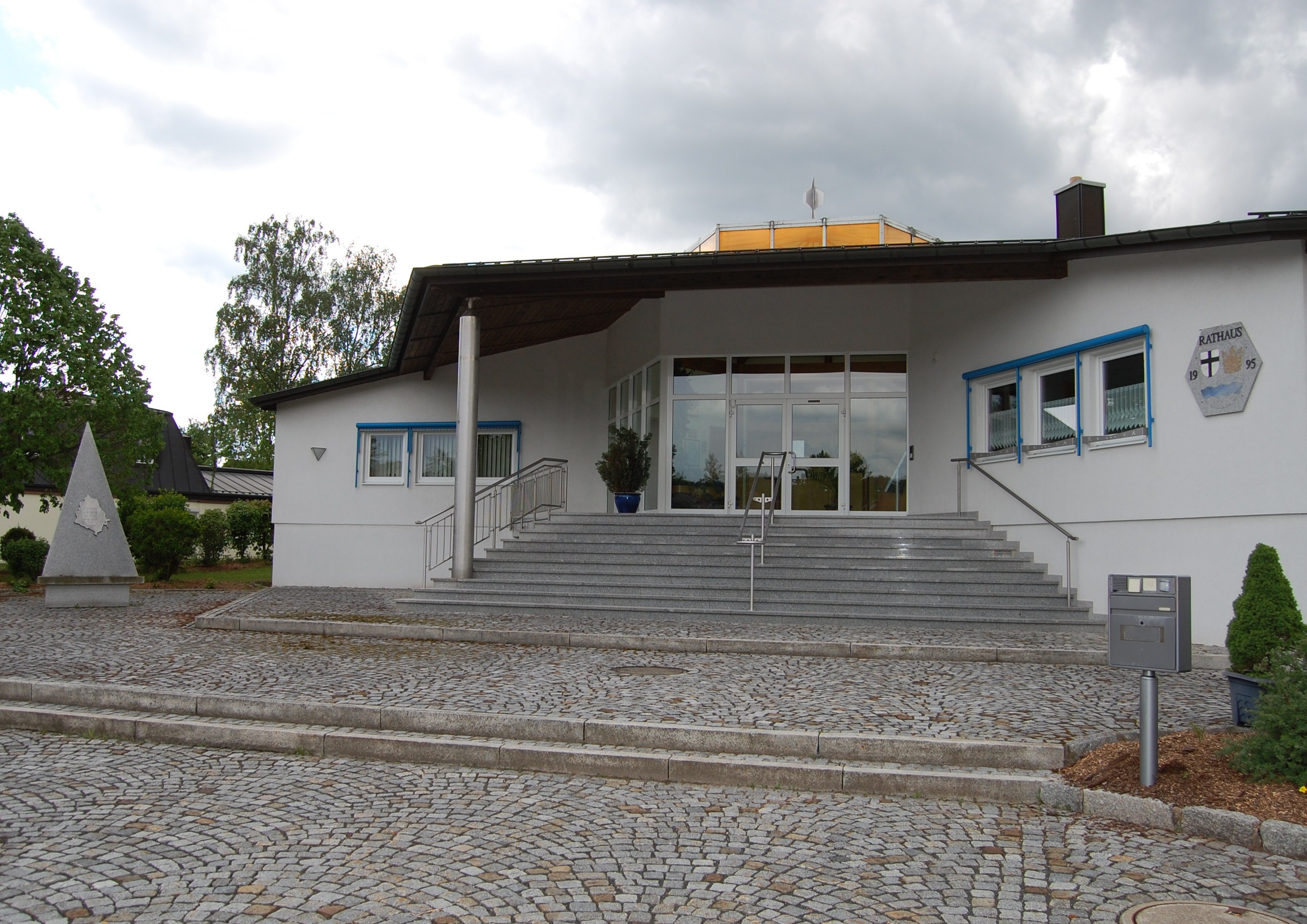 Das neue Rathaus von Schondra, gebaut 1995